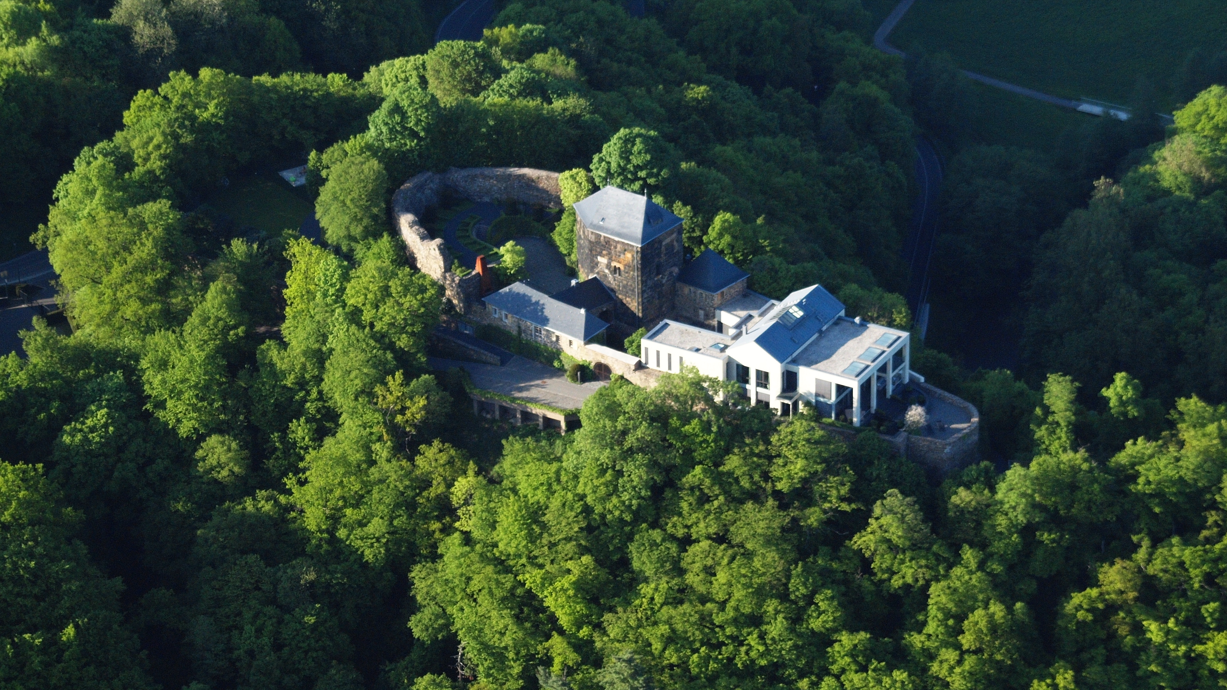 Burg Altenwied in der Gemeinde Neustadt (Wied)